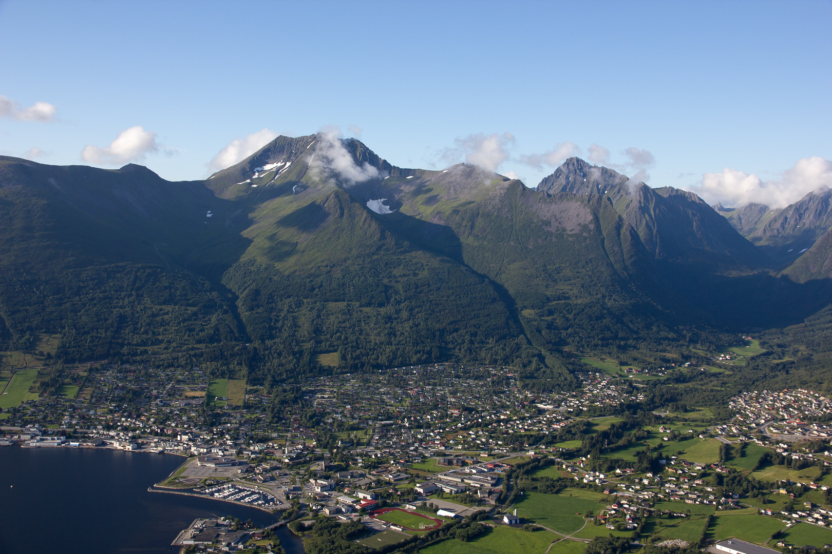 Saudehornet sett fra "Pølsa"